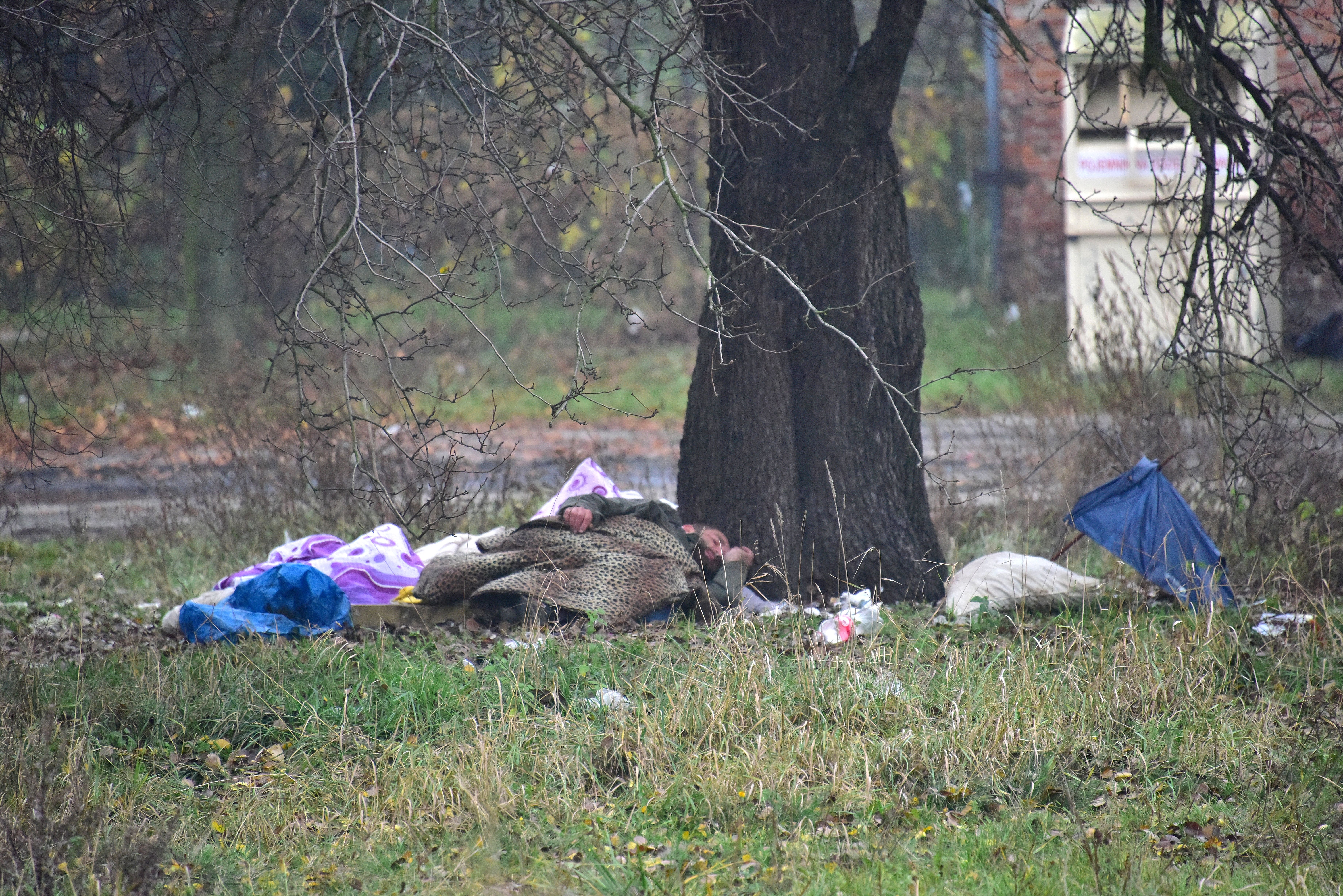 Bezdomny, rejon Dworca Wschodniego. Ulica Lubelska, pomiędzy ulicami Bliską i Frycza-Modrzewskiego w Warszawie